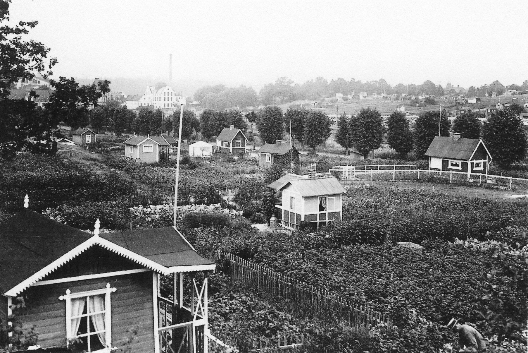 Koloniområdena Stora Hornsberg och Majblomman omkring år 1915